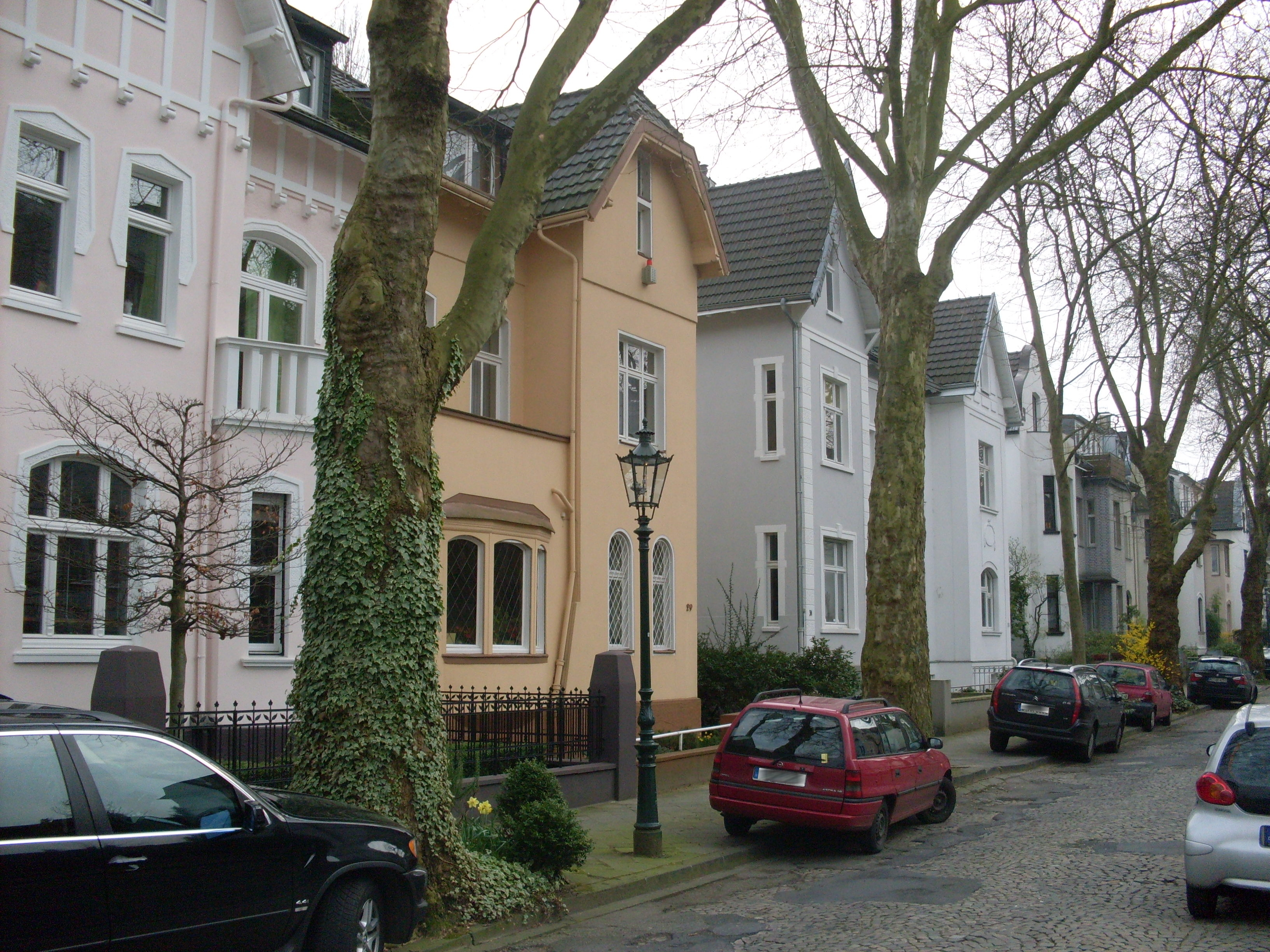 Düsseldorf-Gerresheim Wohngebiet auf der Hardt, Sonnbornstraße